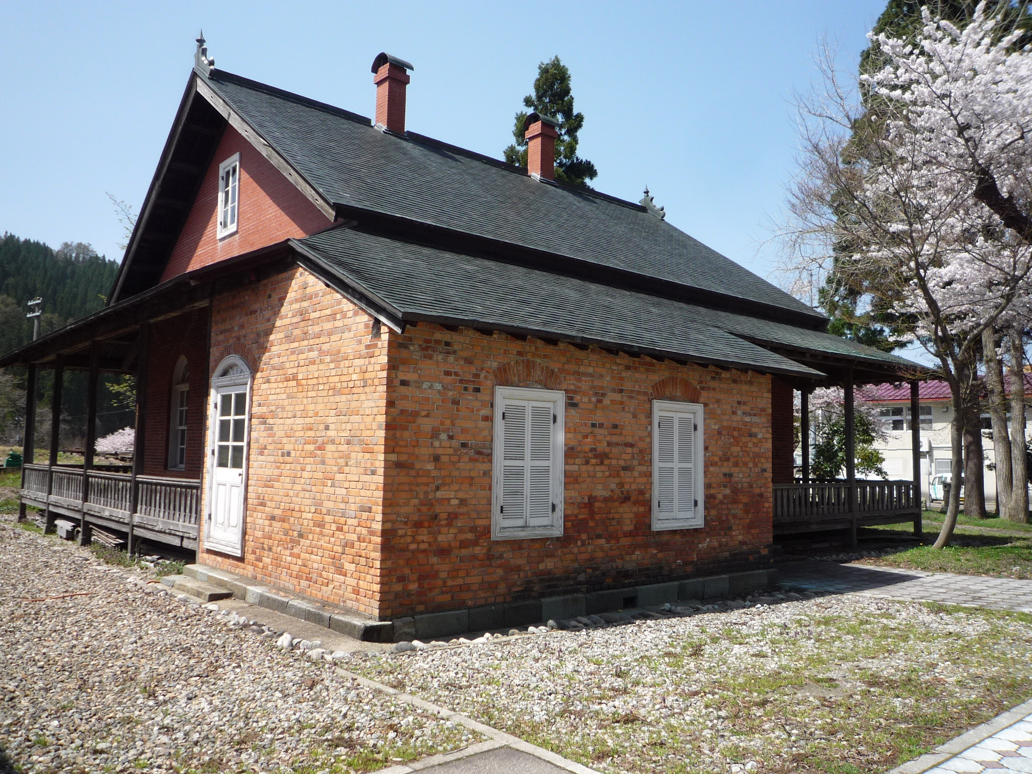 阿仁鉱山 異人館